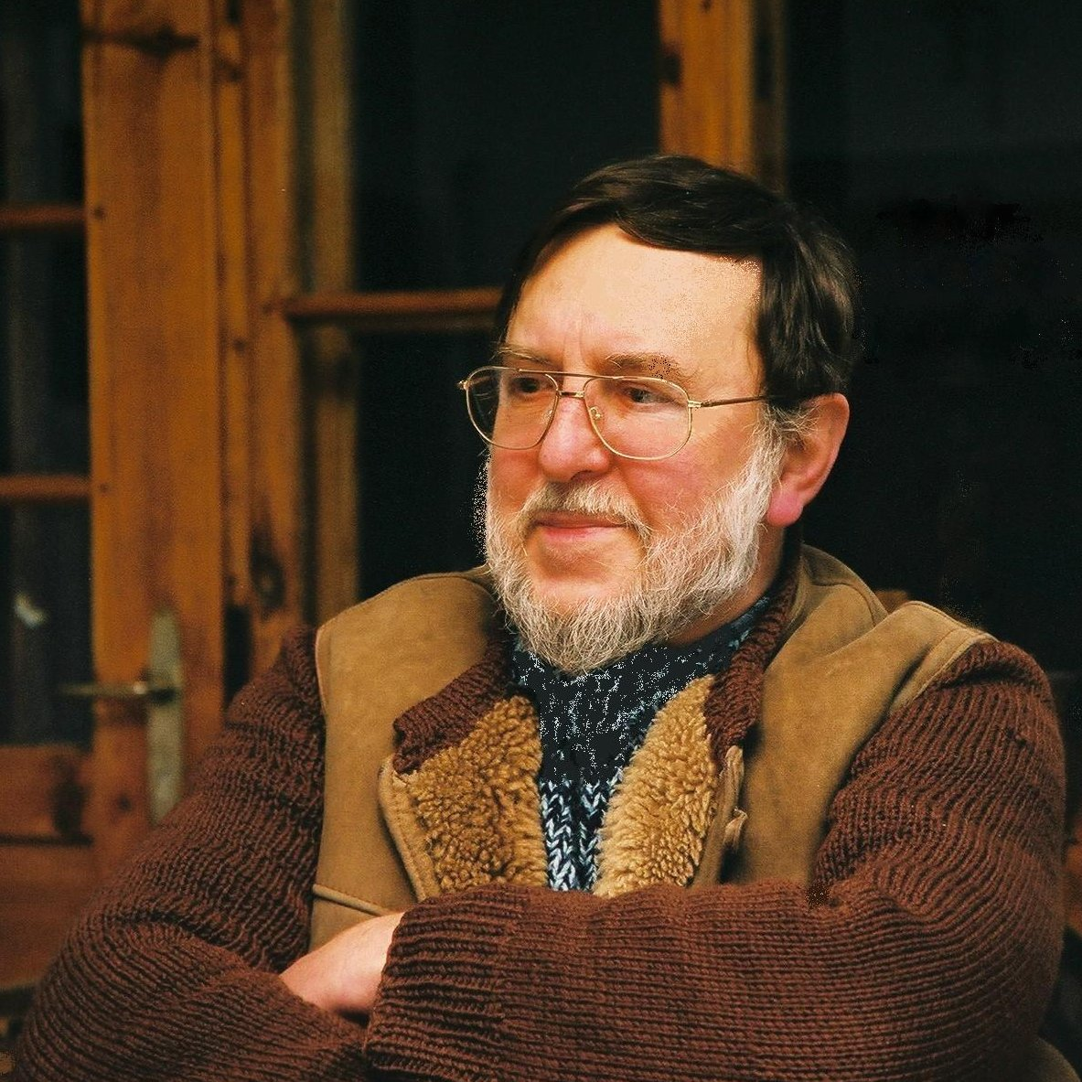 Piotr Poźniak